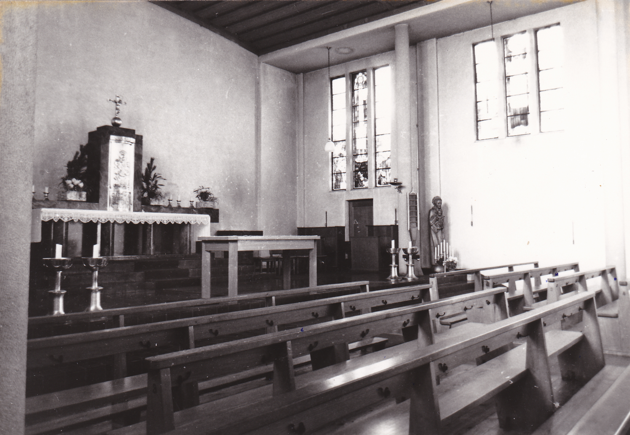 Römisch-katholische Pfarrkirche Heilig Geist von 1940, Innenraum